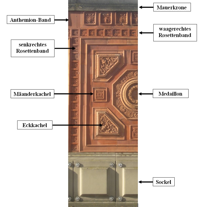 Karl Ludwig von Zanth: Terrakottawand, Entstehungsjahr 1856, Stuttgart, Wilhelma, Wandelgang an der Neckartalstraße. Ausschnitt: linke Hälfte eines Relief-Fries.